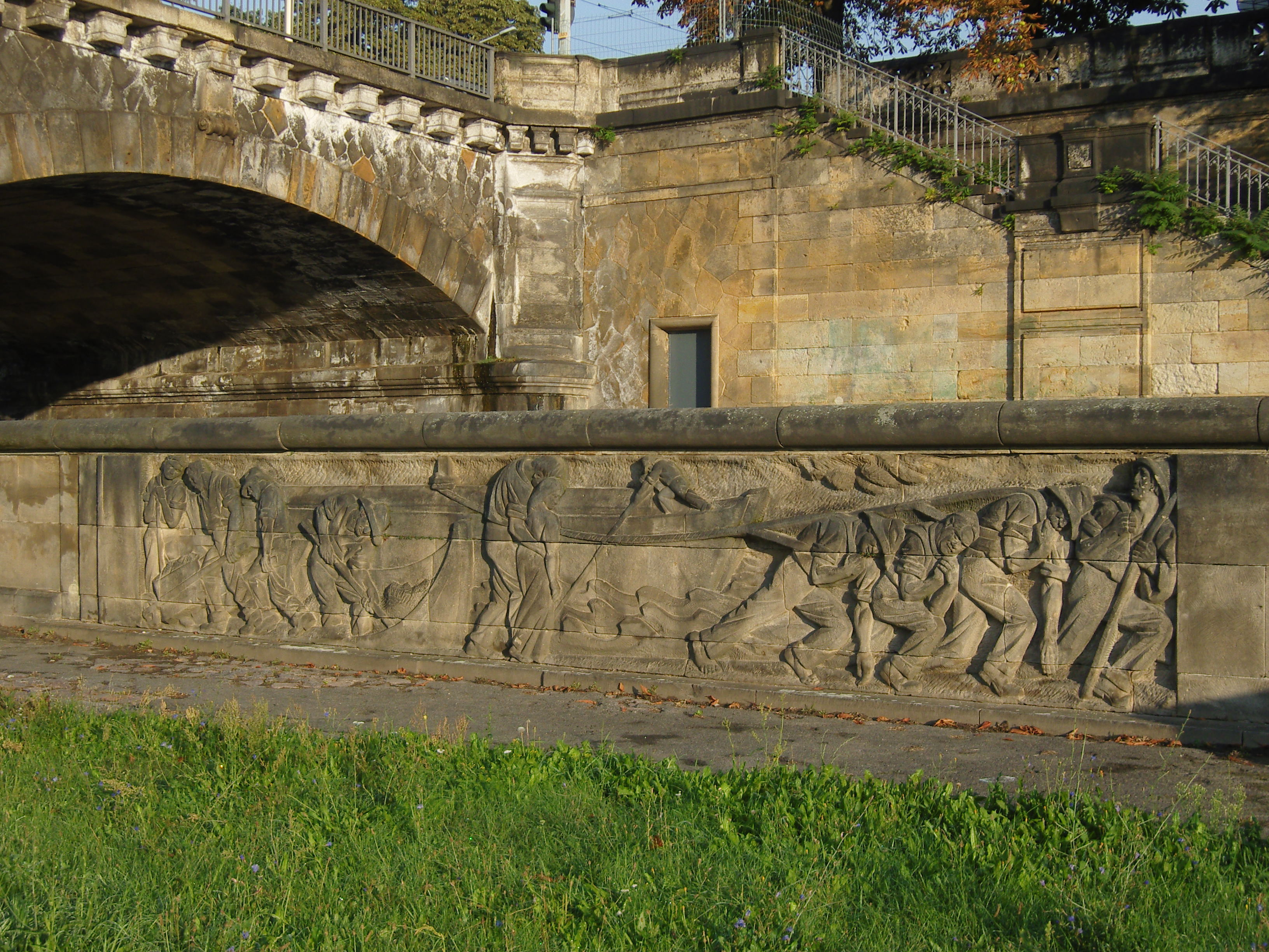 Relief unterhalb der Albertbrücke in Dresden, dargestellt sind Bomätscher, die Schiffe ziehen (auch Treidler genannt), geschaffen 1938 von Edmund Moeller.